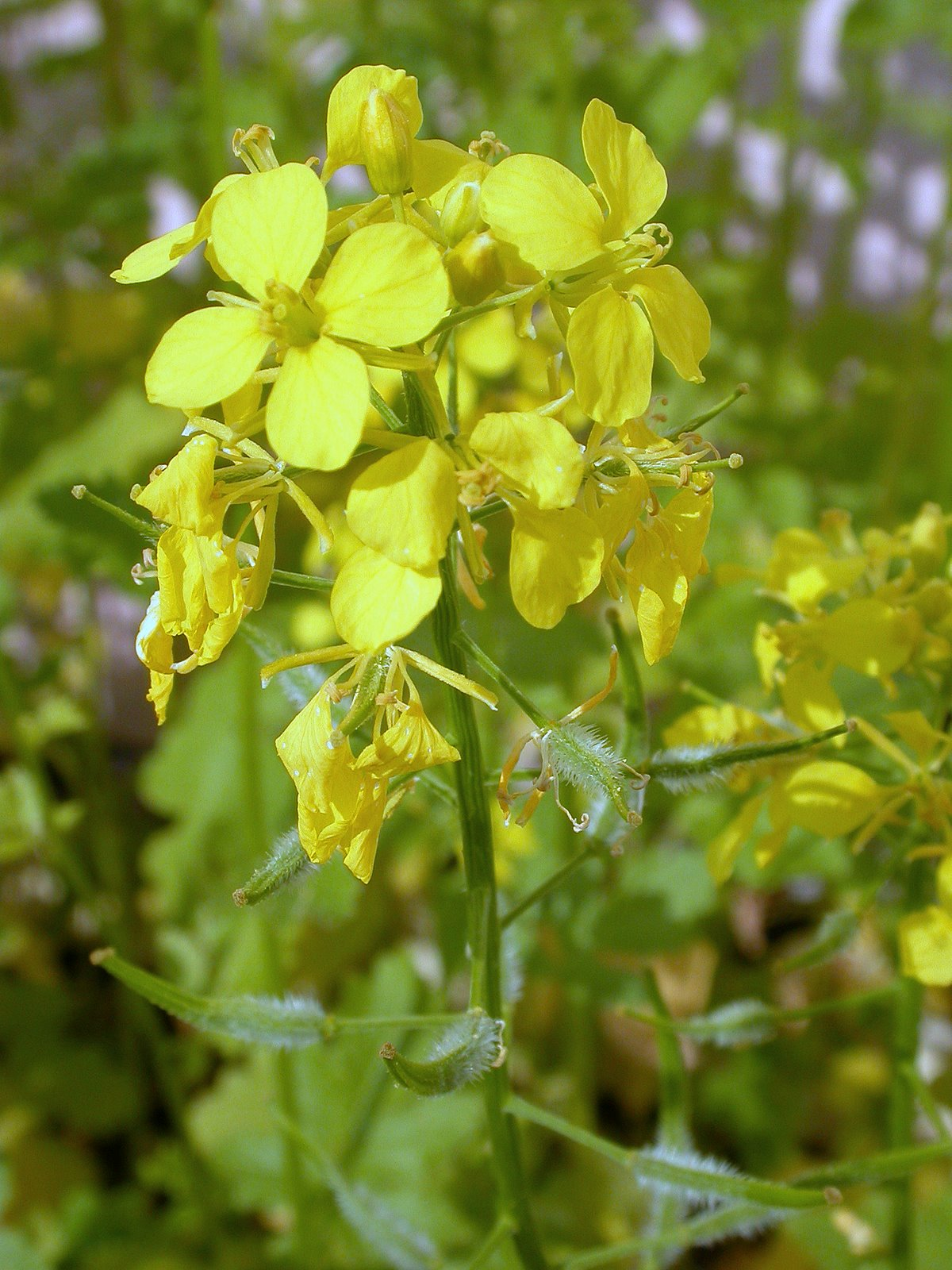 Sinapis alba - Fleur de Moutarde - Mustard flower